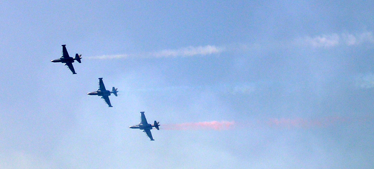 Тройка Су-25 с дымогенераторами цветов российского флага на МАКС-2005